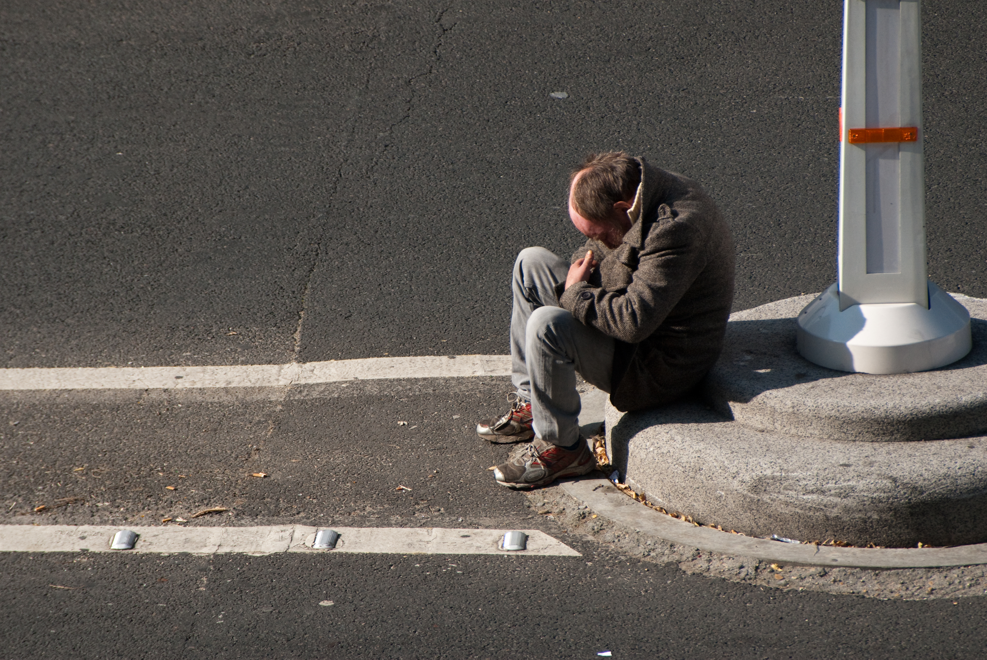 Clochard parisien au milieu du boulevard de l'hôpital à Paris